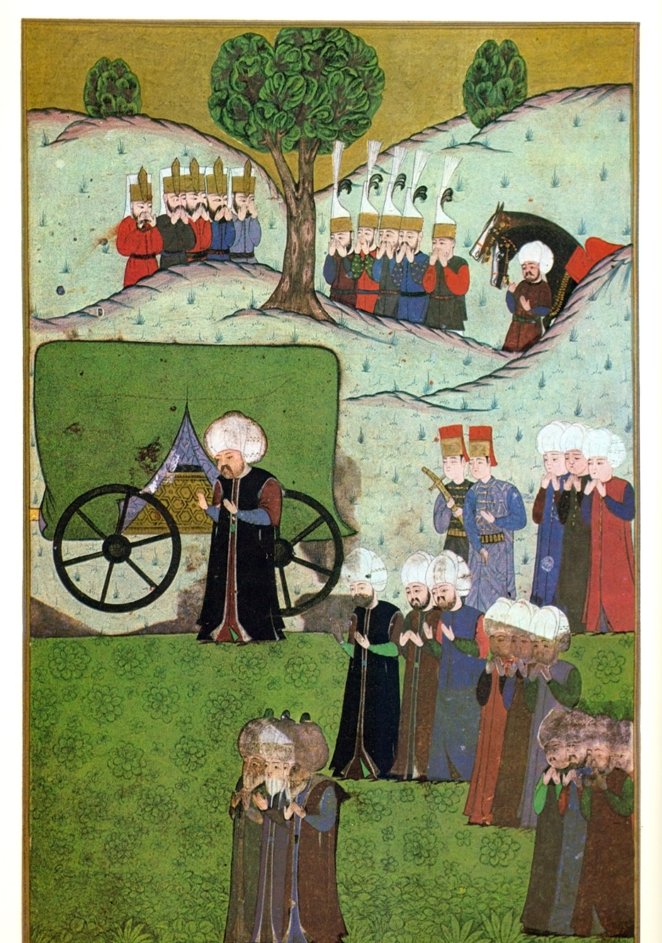 double miniature